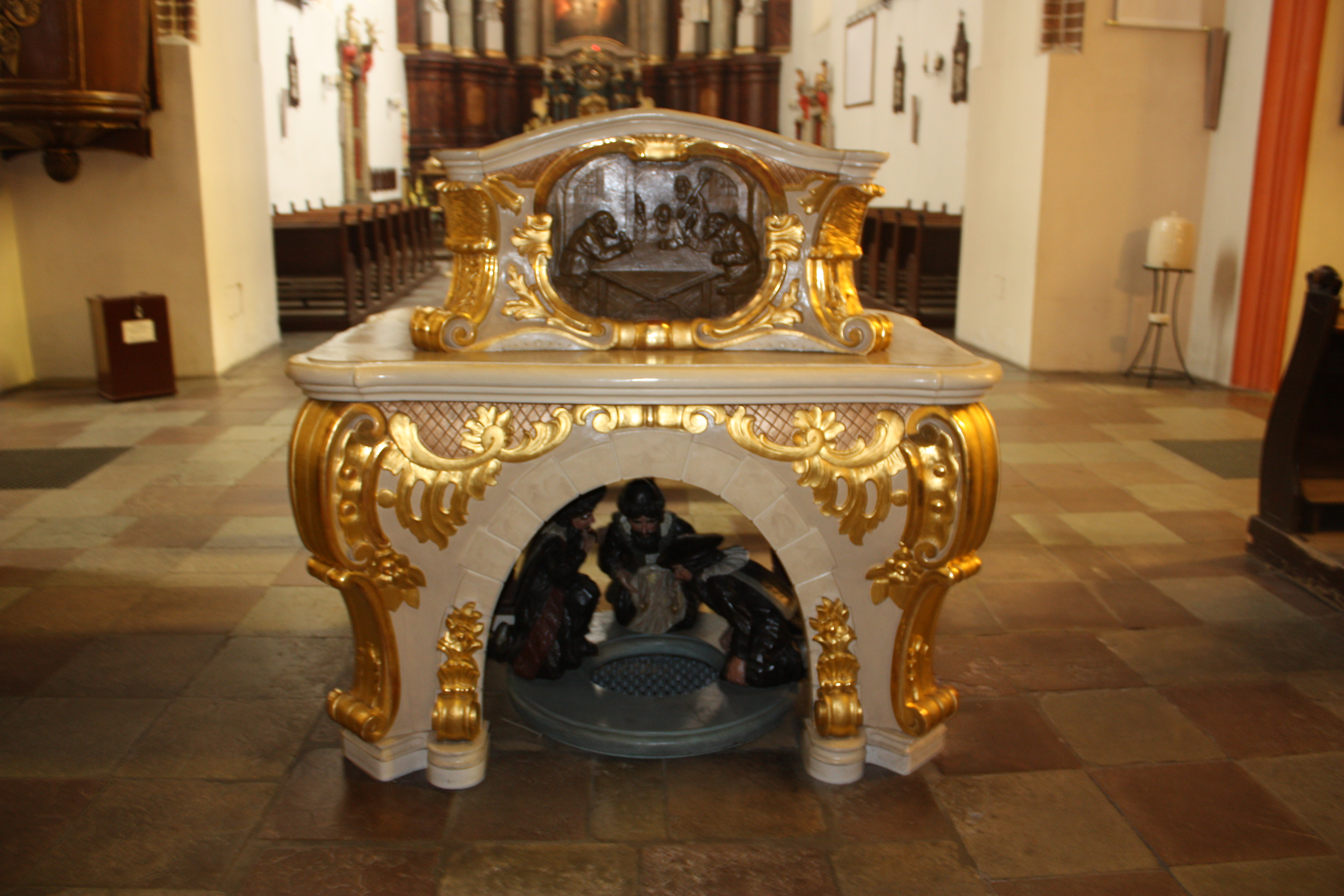 Kościół Bożego Ciała w Poznaniu. Ołtarzyk przedstawiający żydów topiących Hostie w studni.